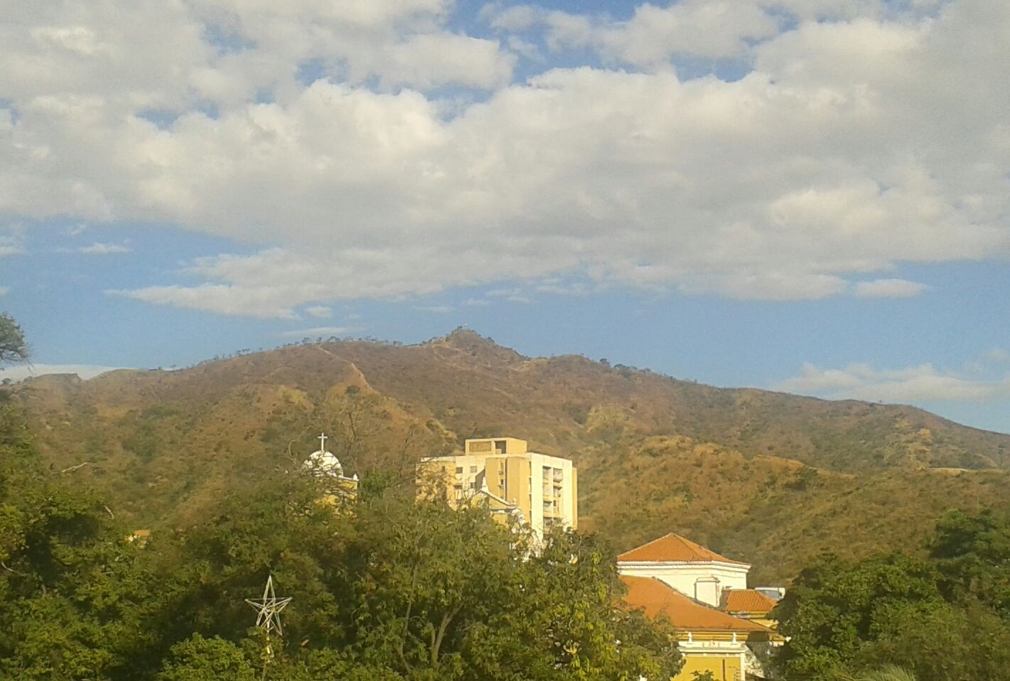 Picacho de Turmero, cumbre visible en el centro con el monumento a la bandera apenas visible.